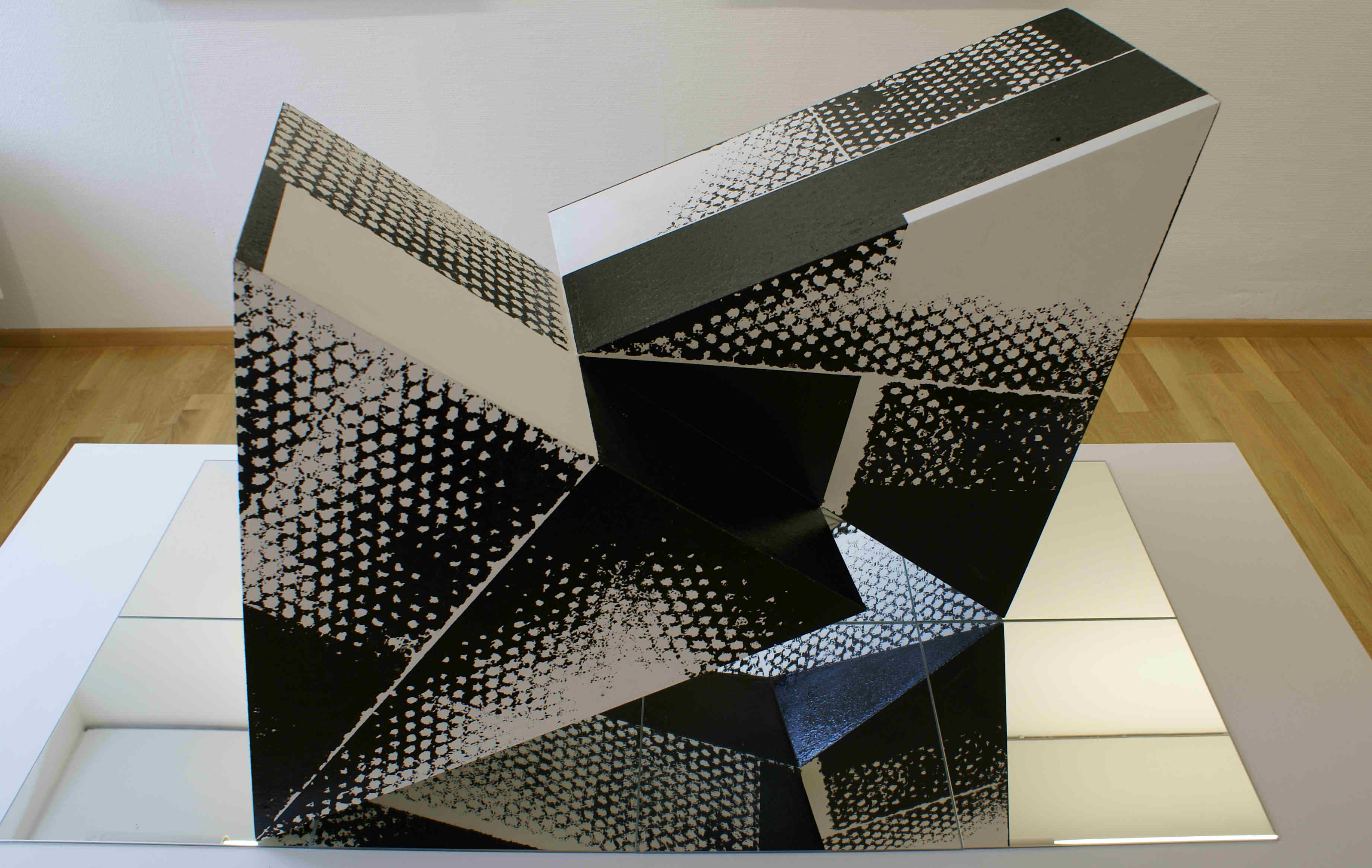 GARTNER, Objekt Variabel, Walzendruck mit Akryl auf MDF-Platte (Basis Spiegel), Durchmesser 120cm, 2009